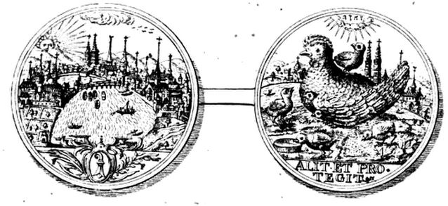 Gluckhennentaler der Münzstätte Basel um 1645